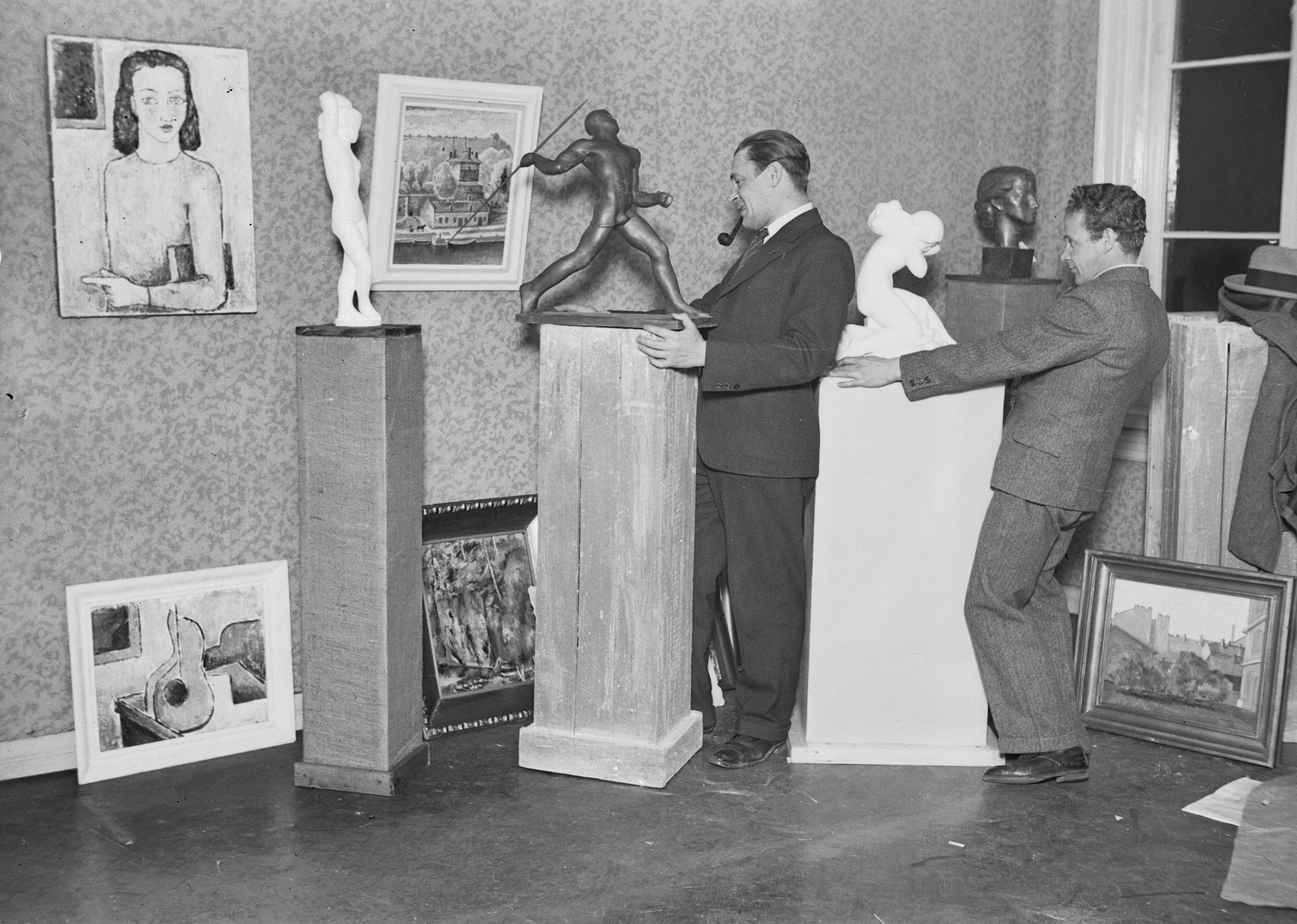 Taiteilijat Ernst Krohn (oikealla) ja Sakari Tohka (keskellä) järjestämässä Lokakuun ryhmän ensimmäistä näyttelyä Helsingissä vuonna 1933.